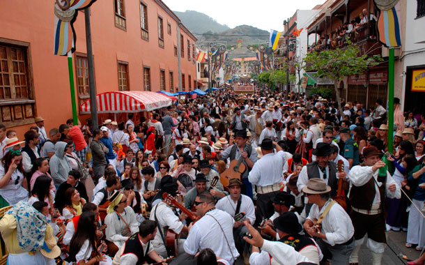 Prebendado Pacheco, calle principal de Tegueste.